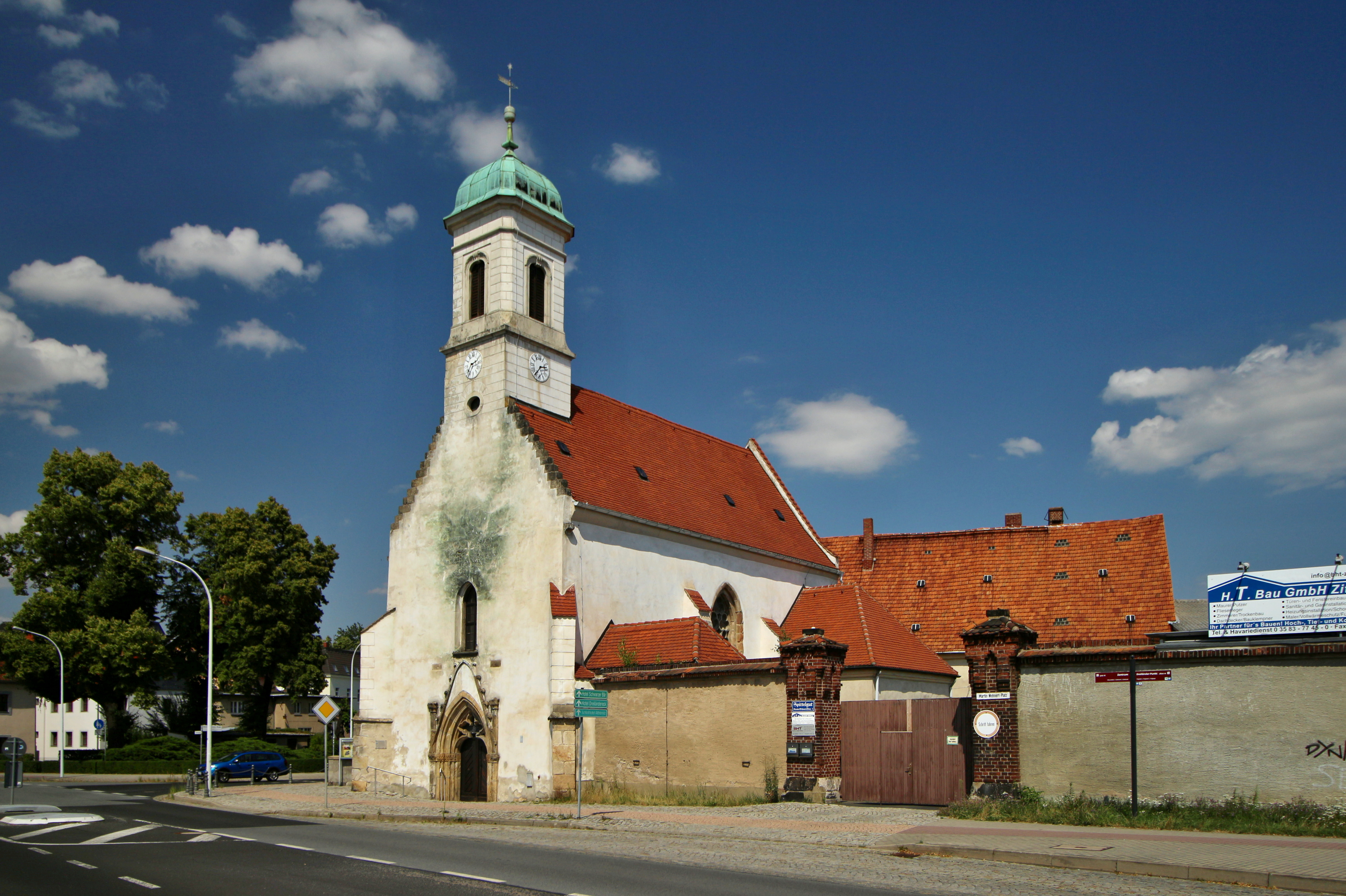 Špitální kostel svatého Jakuba v saské Žitavě